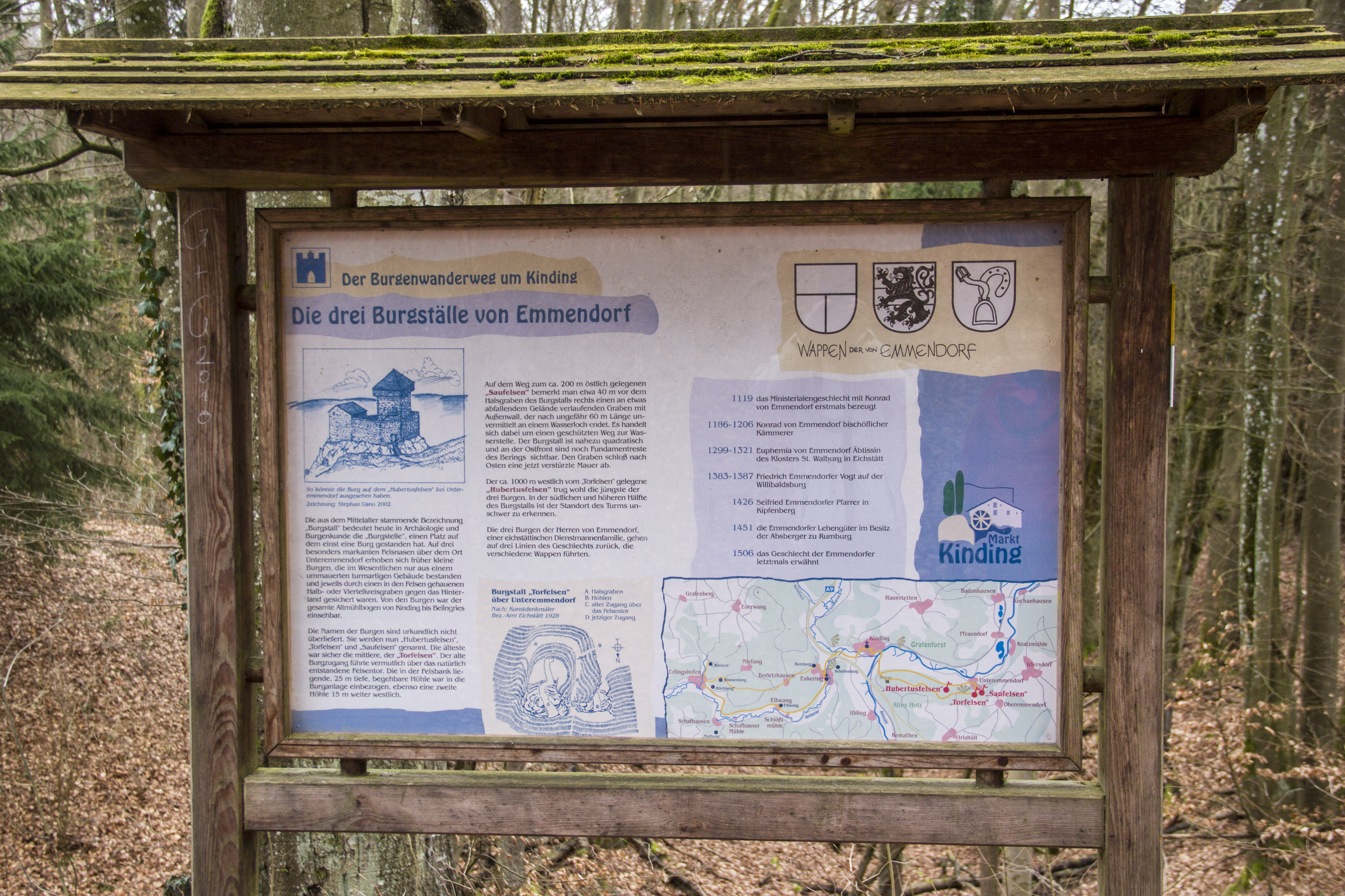 Infotafel